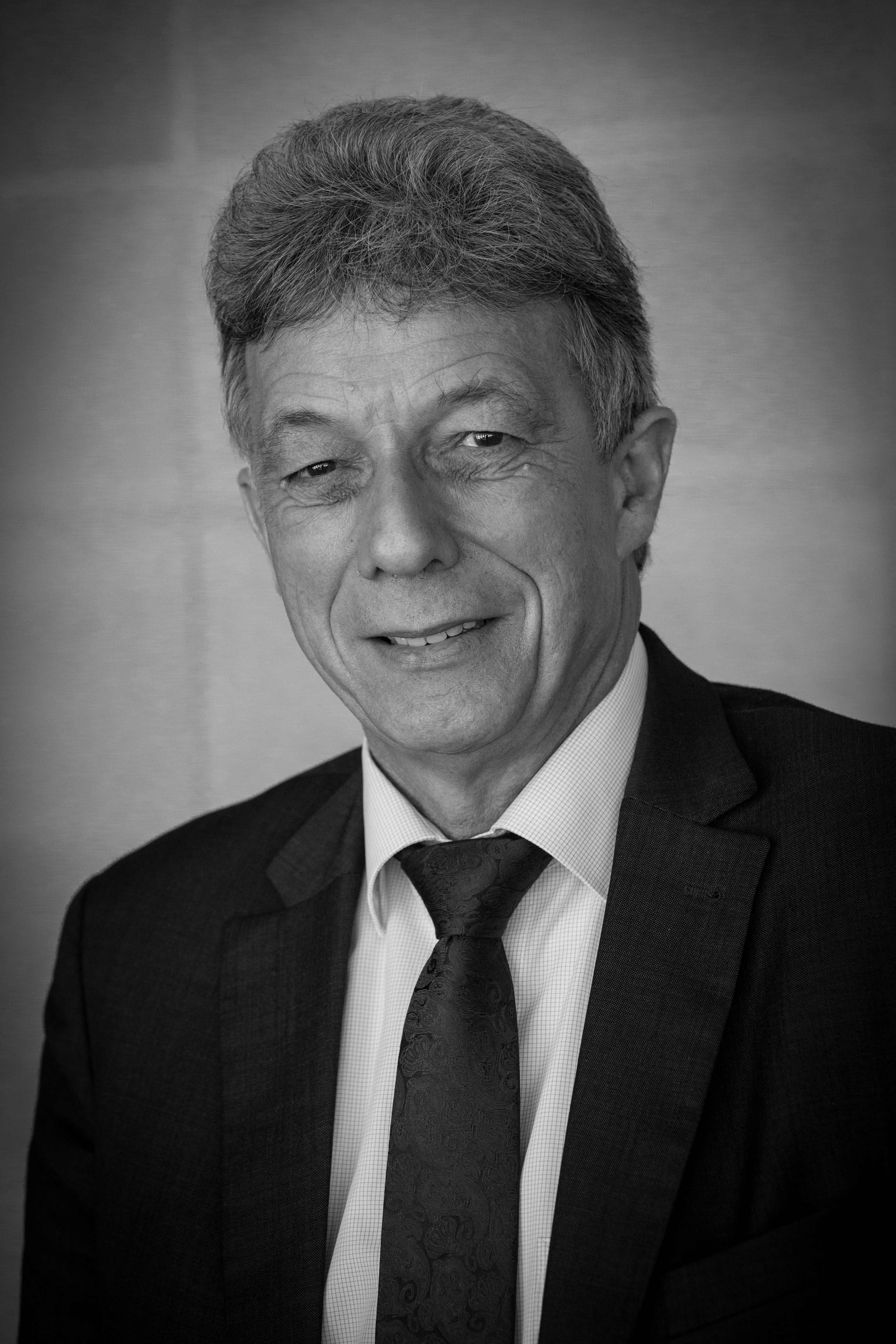 Daniel Gremillet, né à Bruyères le 31 juillet 1953, est un homme politique français.